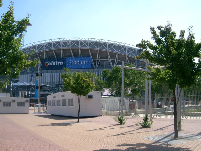 Telstra Stadium